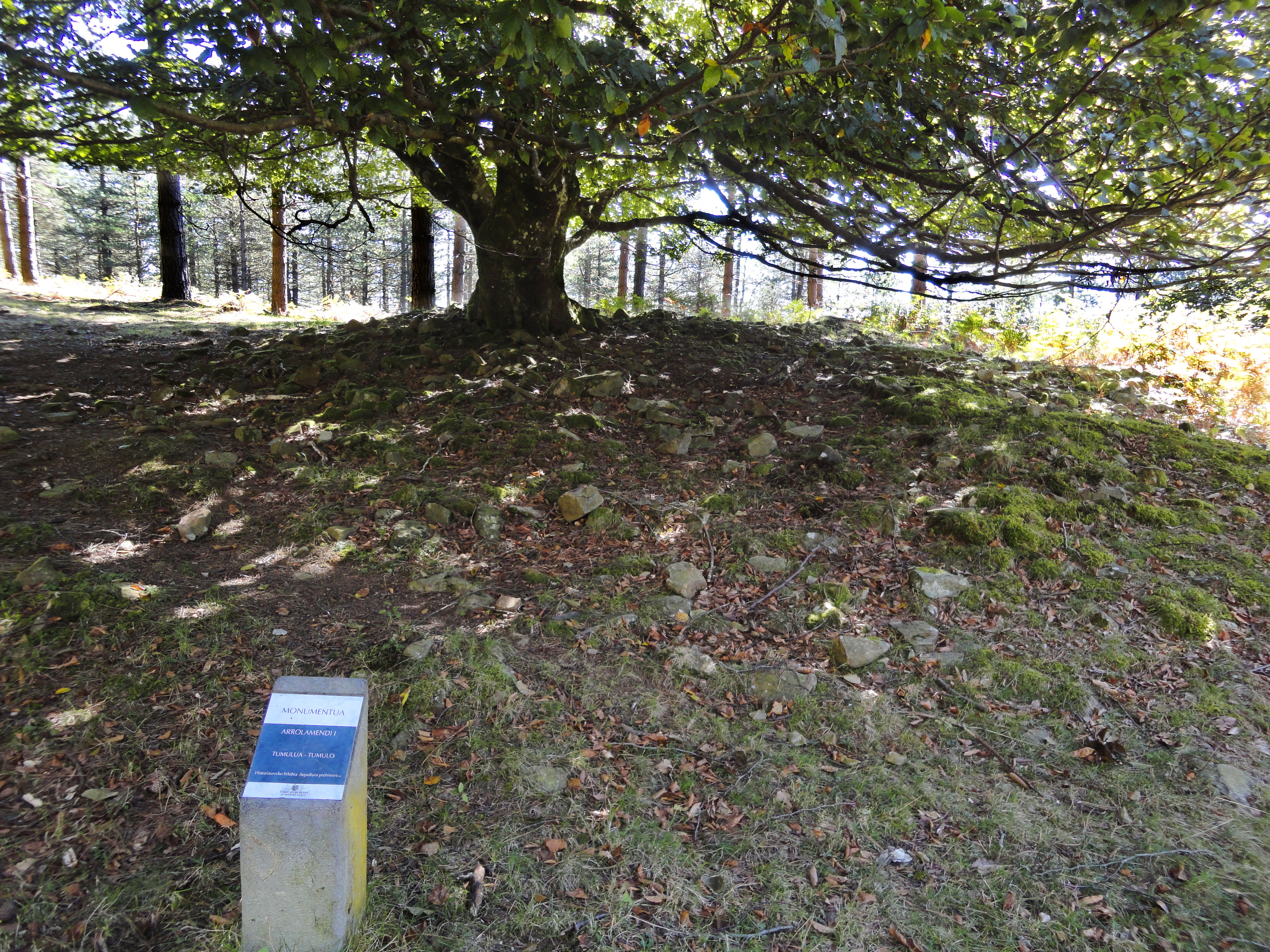 Arrolamendi I tumulua